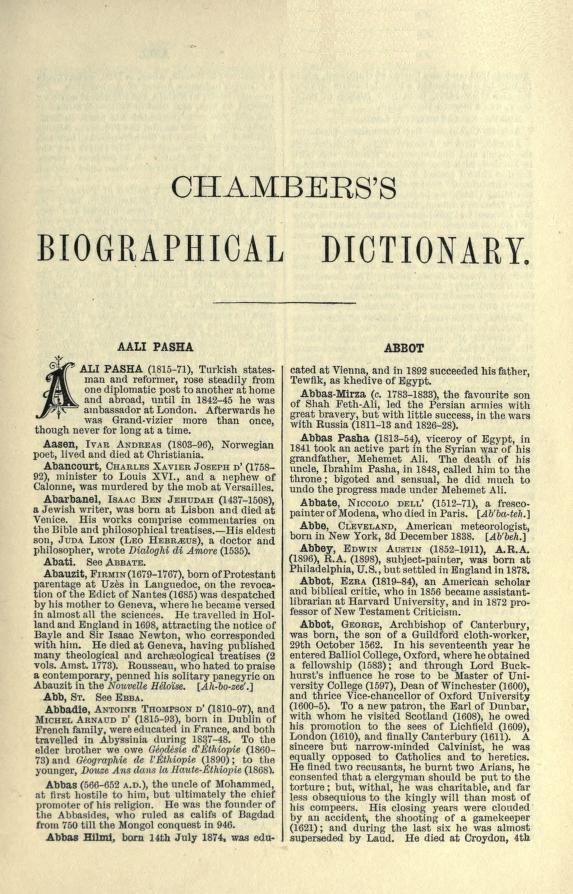 Primera página del Diccionario Biográfico Chambers